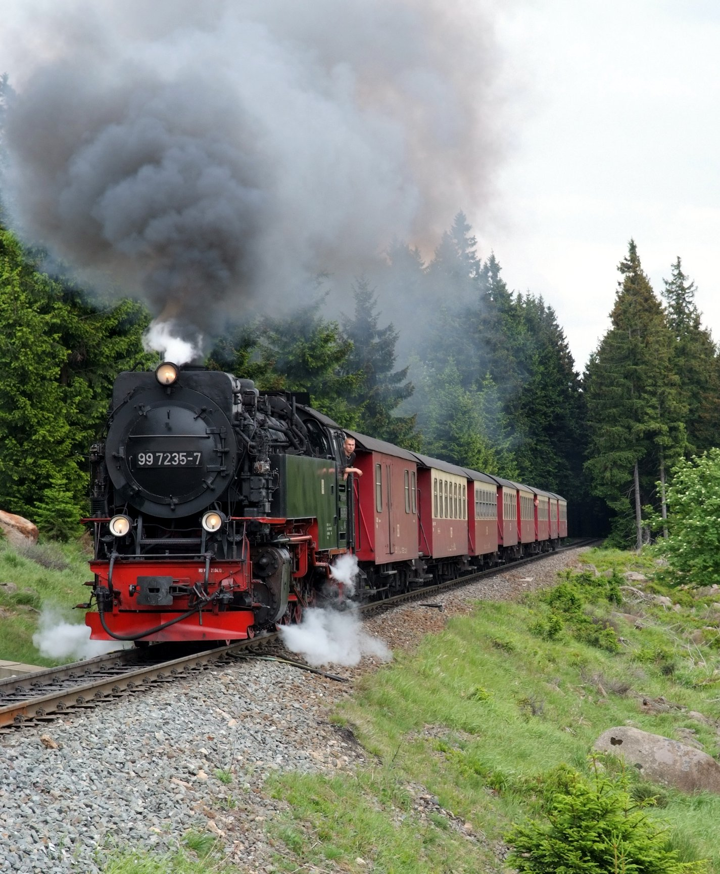 99 7235-7 zieht einen Personenzug auf den Brocken